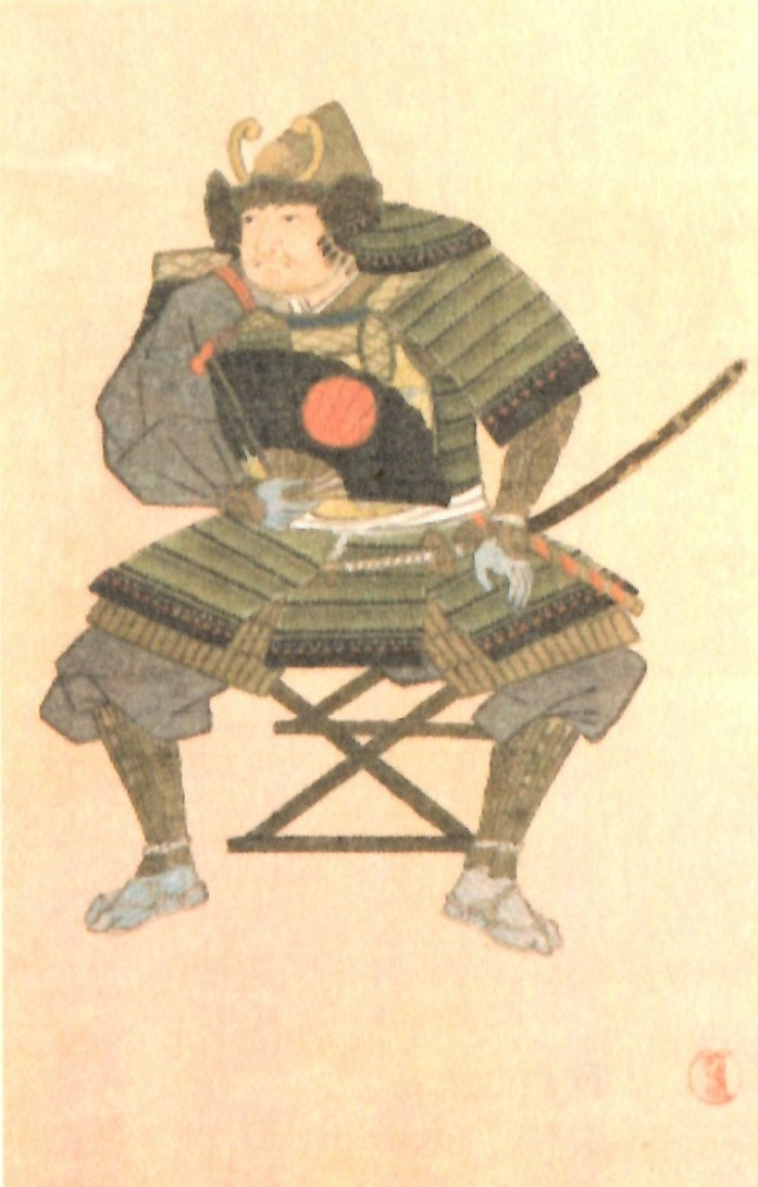 松平親盛の肖像。